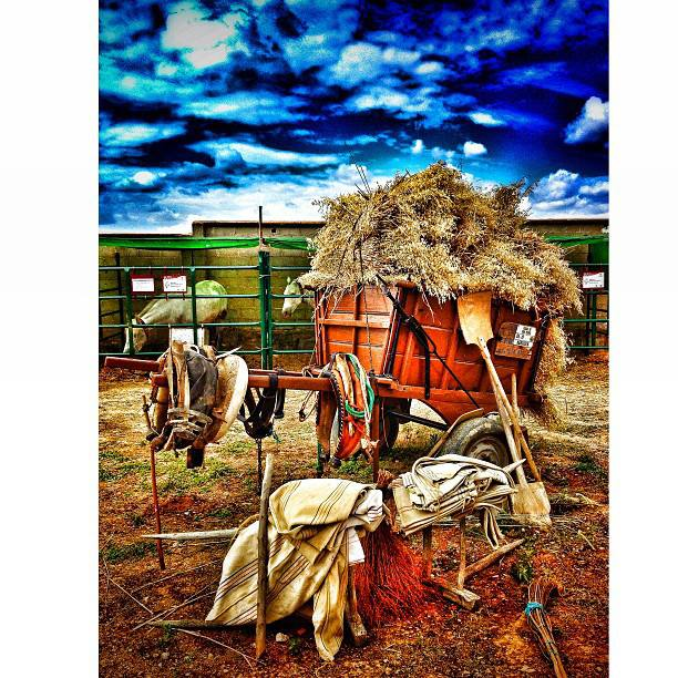 Exposición de utensilios utilizados en la antigüedad por agricultores y ganaderos.